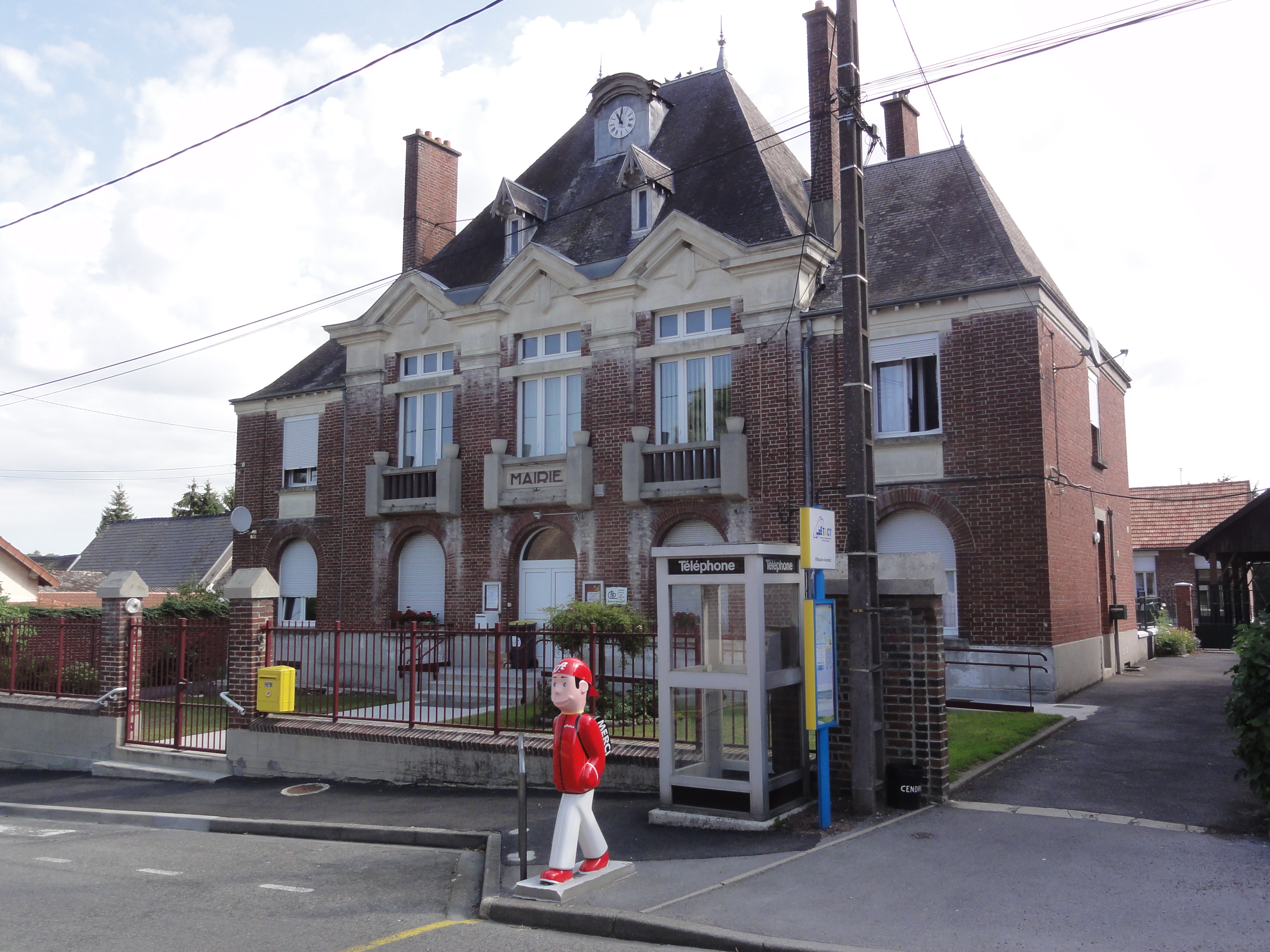 Villequier-Aumont (Aisne) mairie